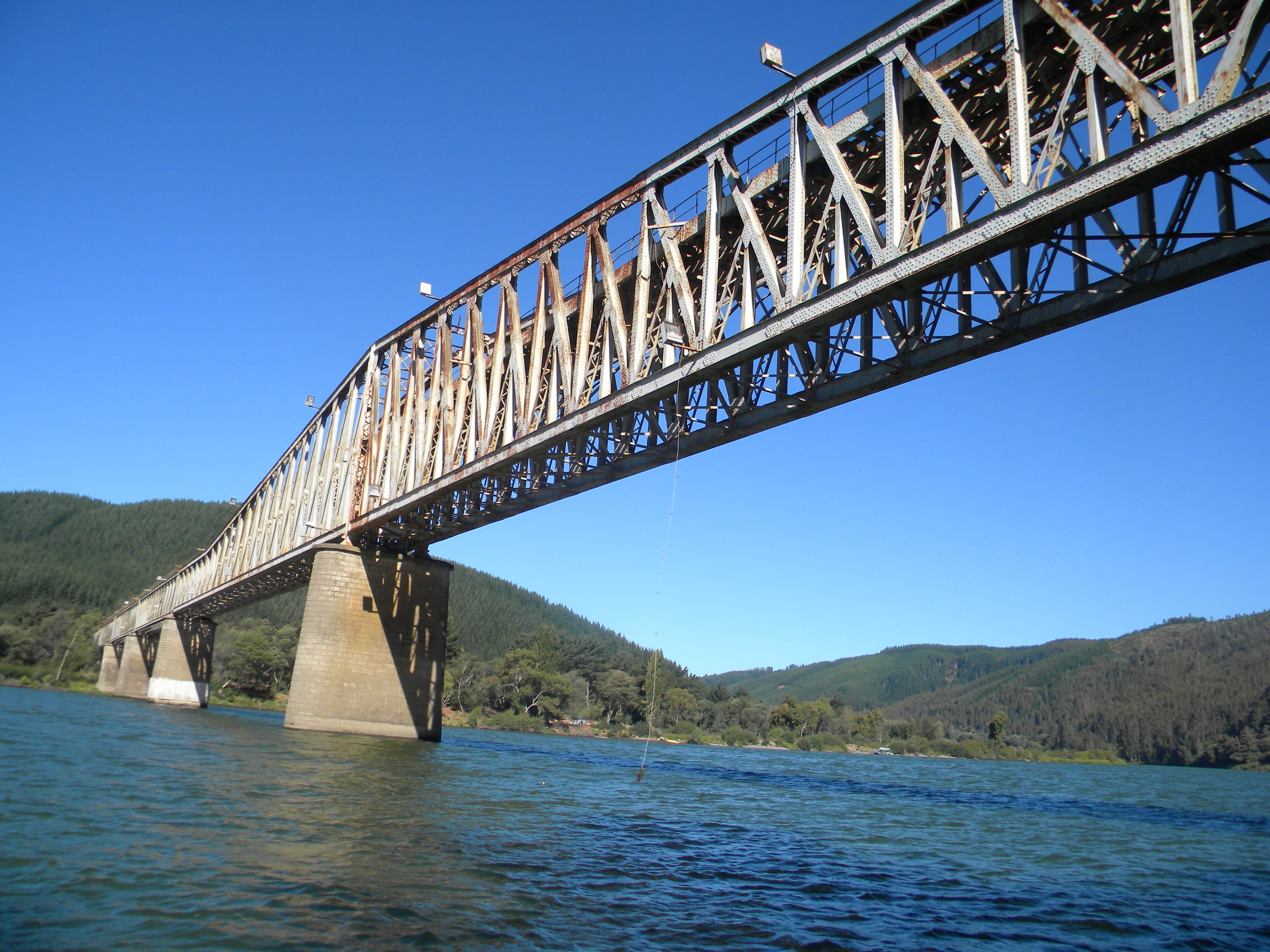 Sobre este puente centenario, pasa el último tren del tipo ramal que queda en Chile, que transporta pasajeros en múltiples estaciones ubicadas en la ribera norte del río Maule, y que llega desde Talca a la ciudad costera de Constitución. This is a photo of a national monument in Chile: 2085